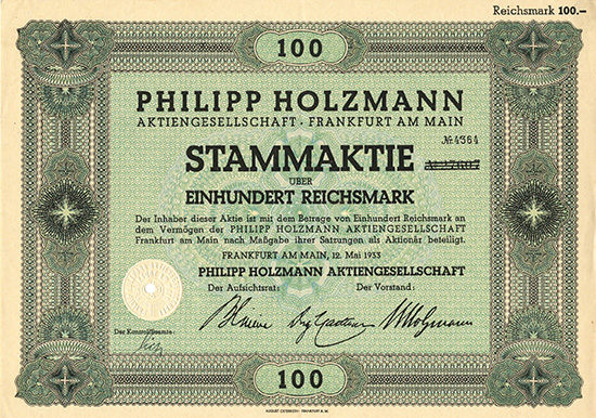 Stammaktie über 100 Reichsmark vom 12.5.1933